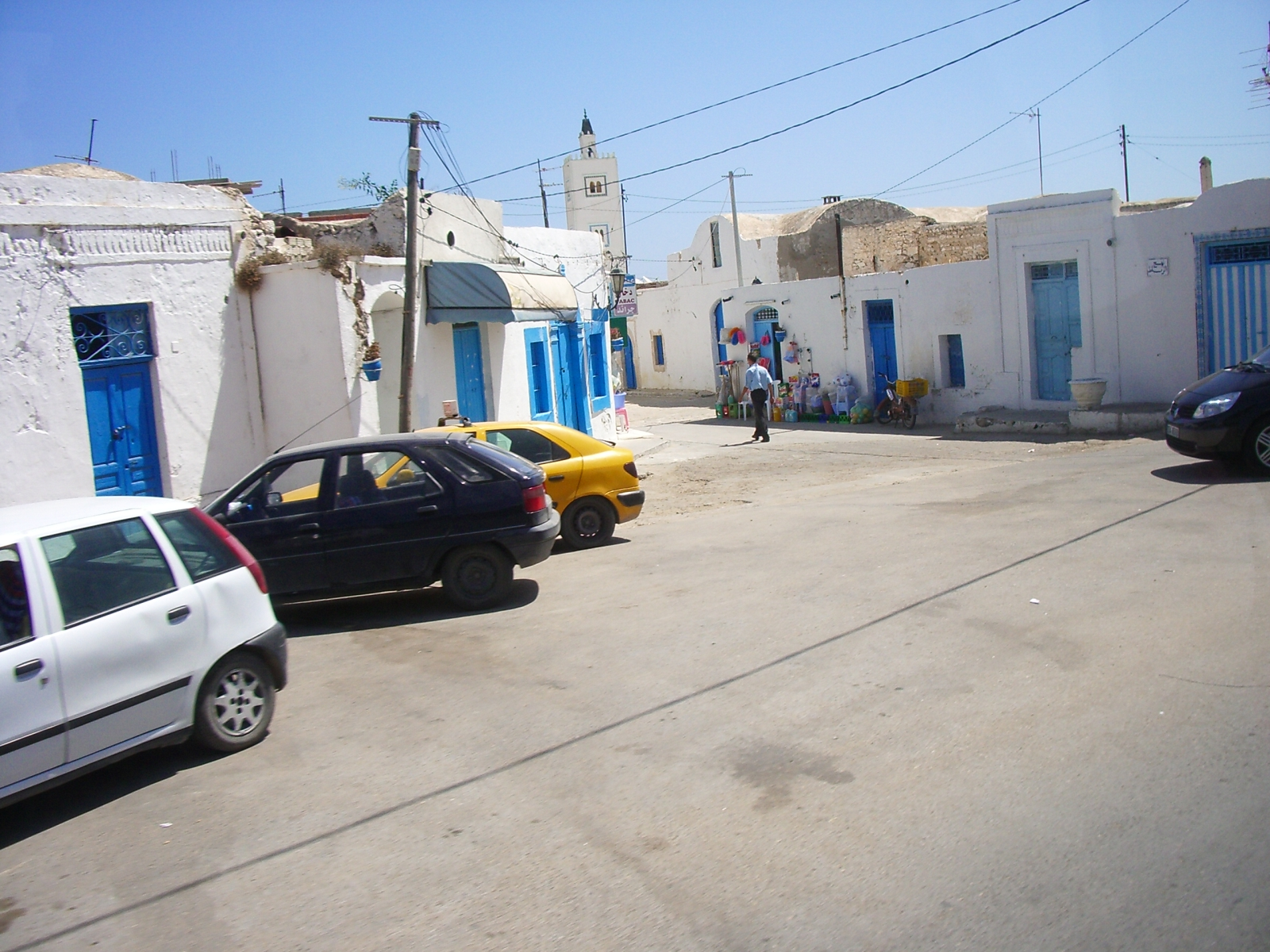 centro della città di Lamta